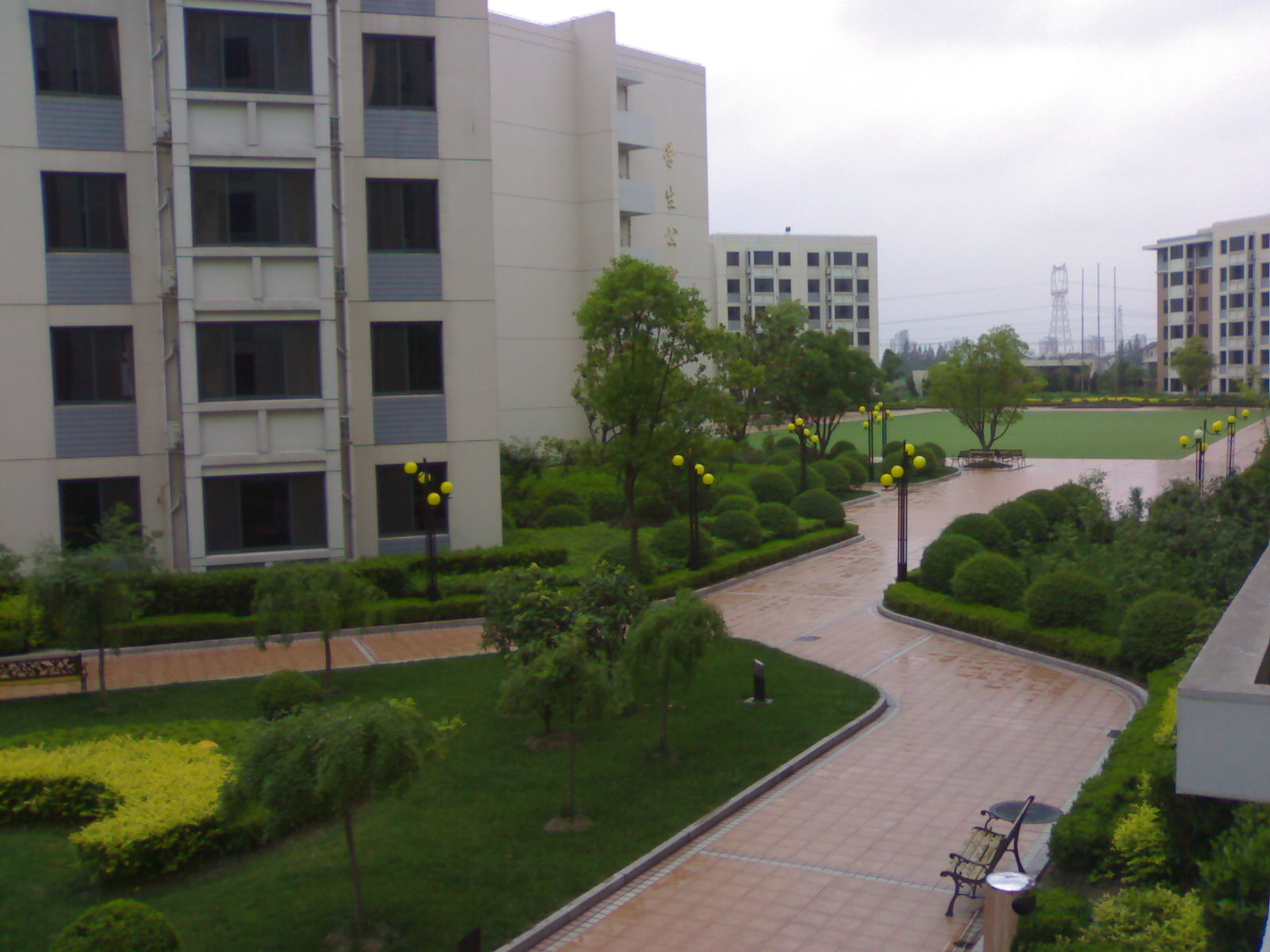 上海尚德實驗學校宿舍區